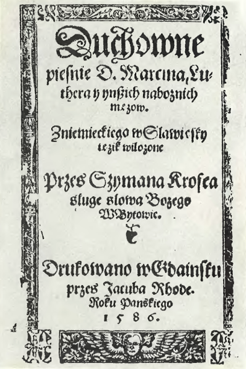 “Duchowne piesnie D. Marcina Luthera y ynszich naboznich mezow. Zniemieckiego wSlawięsky iezik wilozone Przes Szymana Krofea sluge slowa Bozego WBytowie. Drukowano wGdainsku przes Jacuba Rhode. Roku Panskiego 1586.” Strona tytułowa. 1586